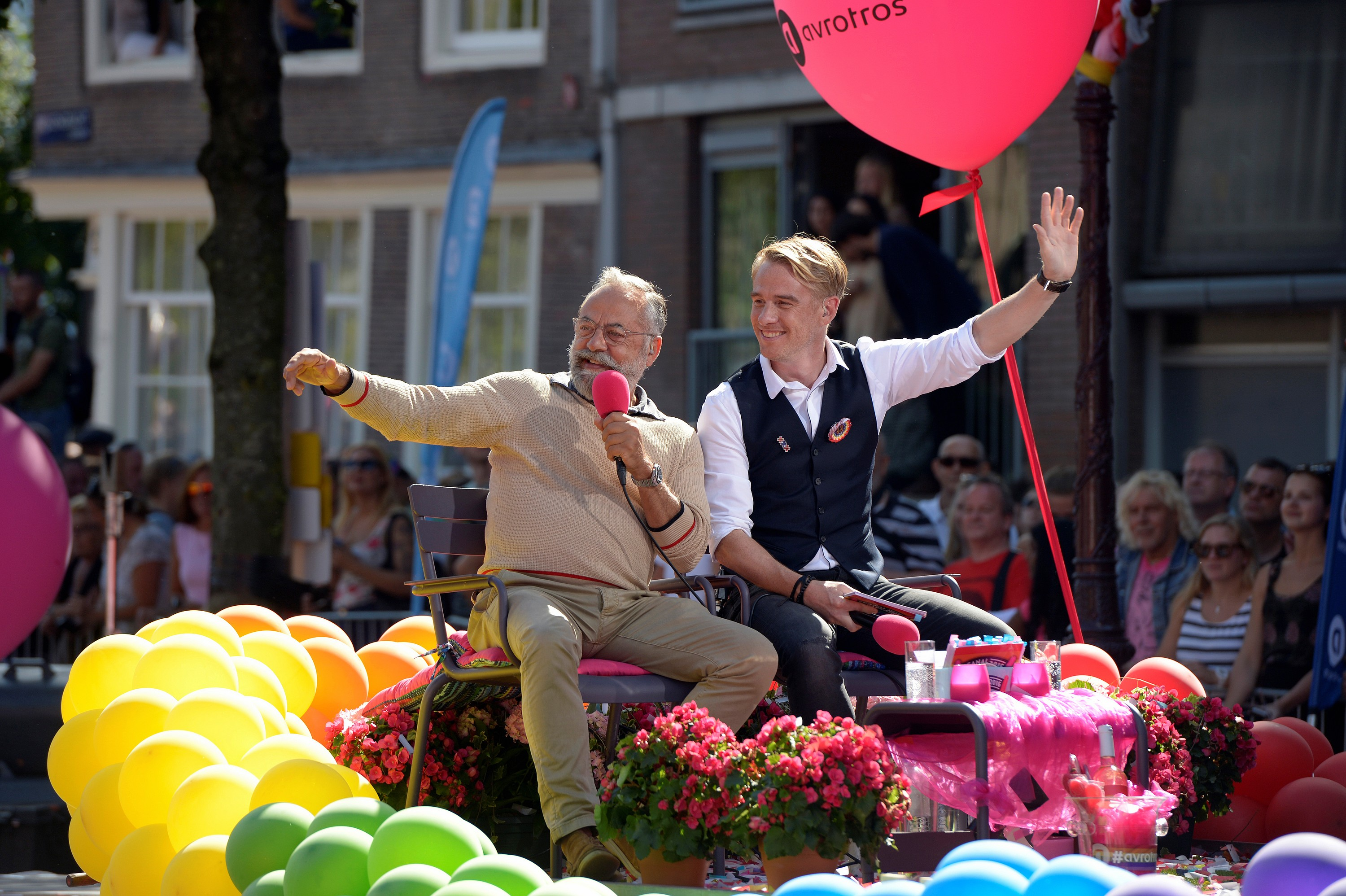 PvdA-boot op de EuroPride 2016 . Fotograaf: Frank van Engelen